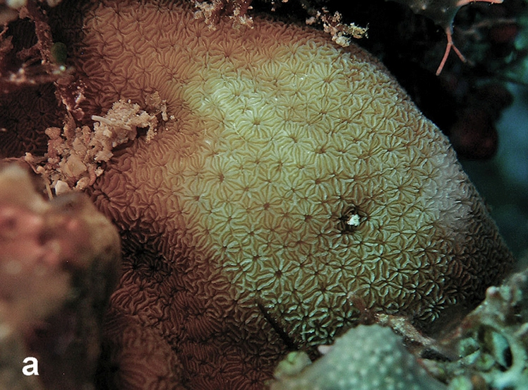 Pavona duerdeni, en Pulau Layang-Layang, islas Spratly, 2013.